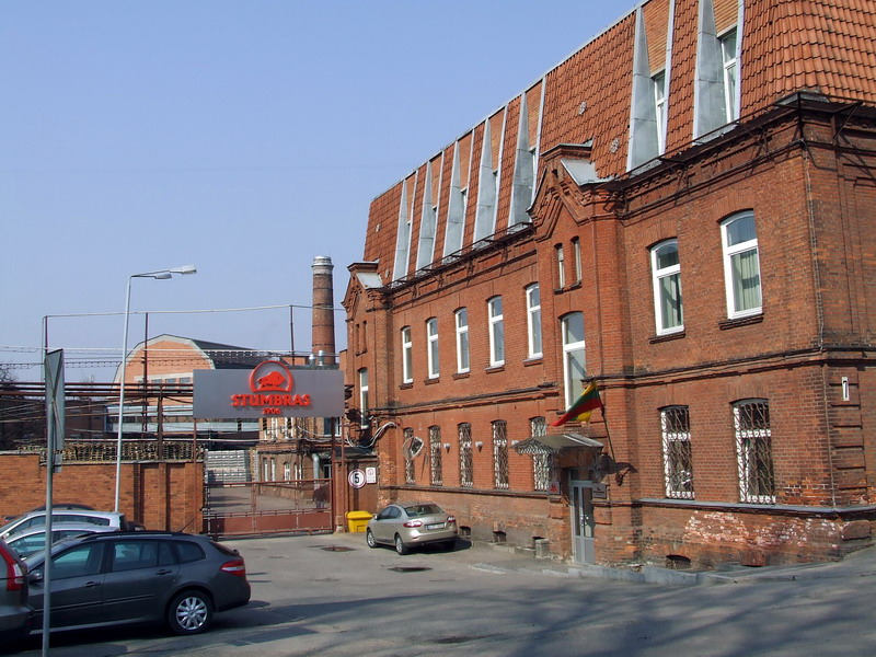 AB Stumbras.